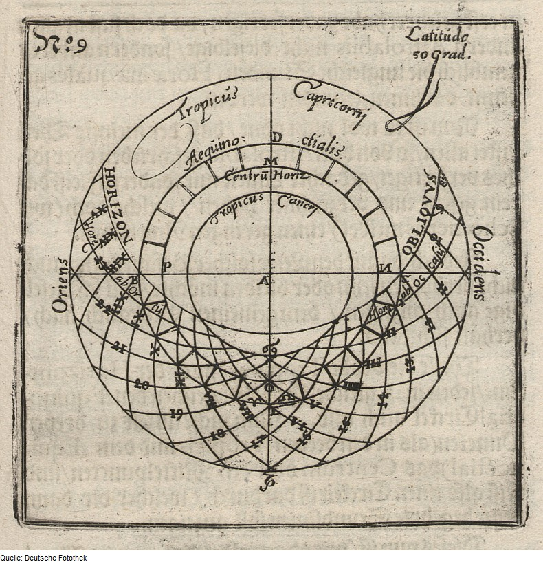 Original image description from the Deutsche Fotothek Astronomie & Messgerät & Winkel